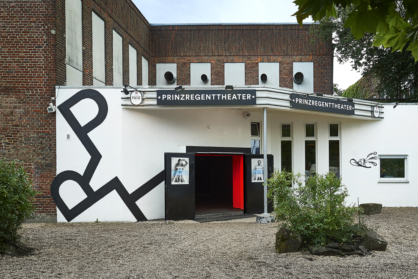 Prinz-Regent-Theater, Prinz-Regent-Str. 50-60, 44795 Bochum - Außenansicht